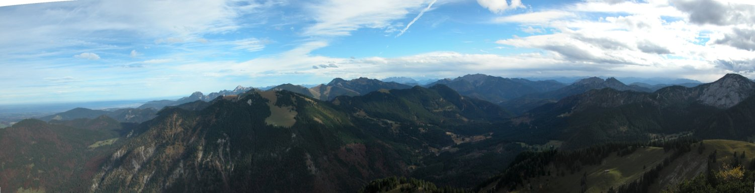 Panoramabild vom Mangfallgebirge. Aufnahme vom Wallberg aus aufgenommen in Richtung Ost bis Süd.